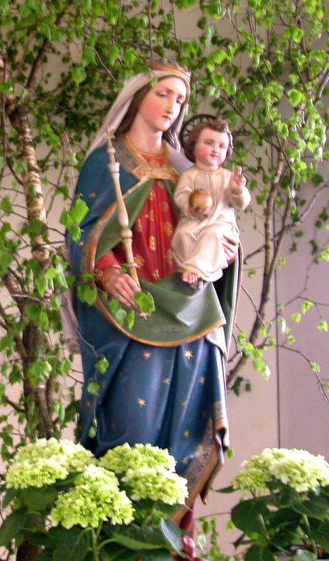 GottesMuter Maria mit Christus. Urbanus Kirche. Dorsten-Rhade.